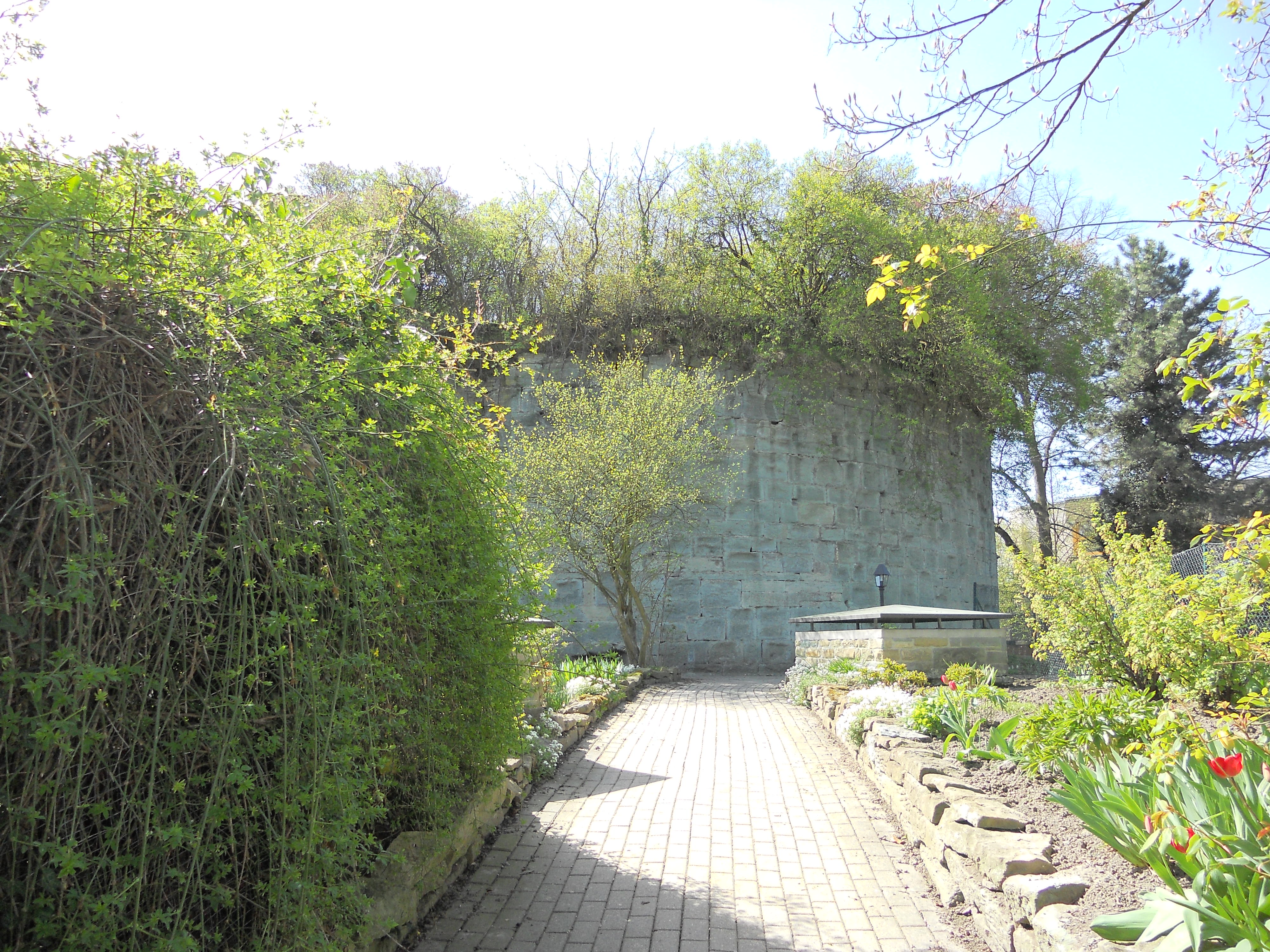 Ruine des Werler Grafenschlosses.